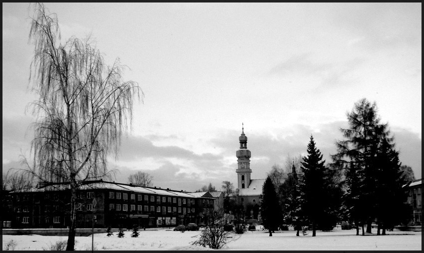 miasto Tychy i jego mały ryneczek w okresie zimowym.